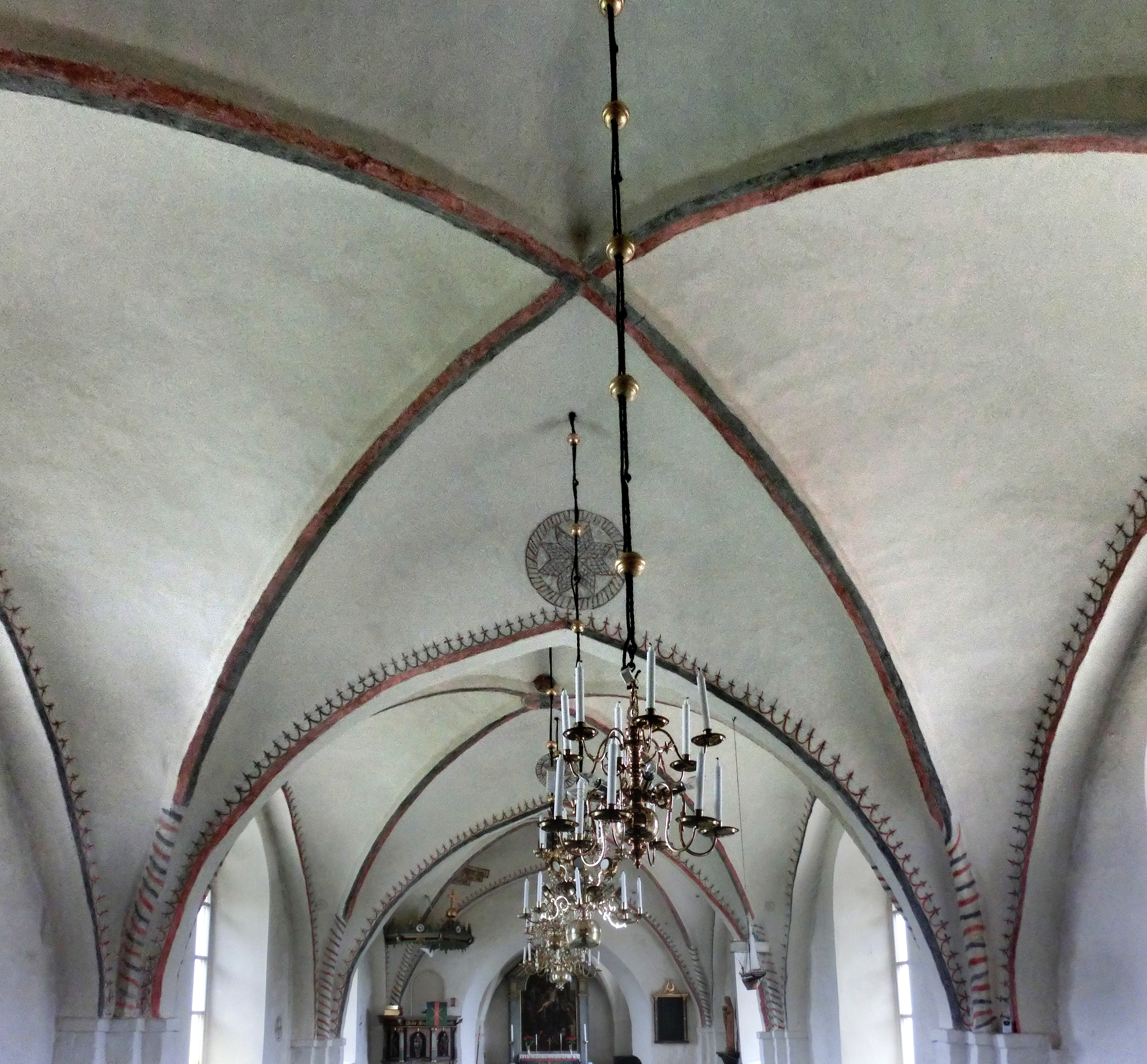 Takvalven i Söndrums kyrka i Söndrums socken, Halmstads kommun, Halland, Hallands län, Göteborgs stift, Sverige.